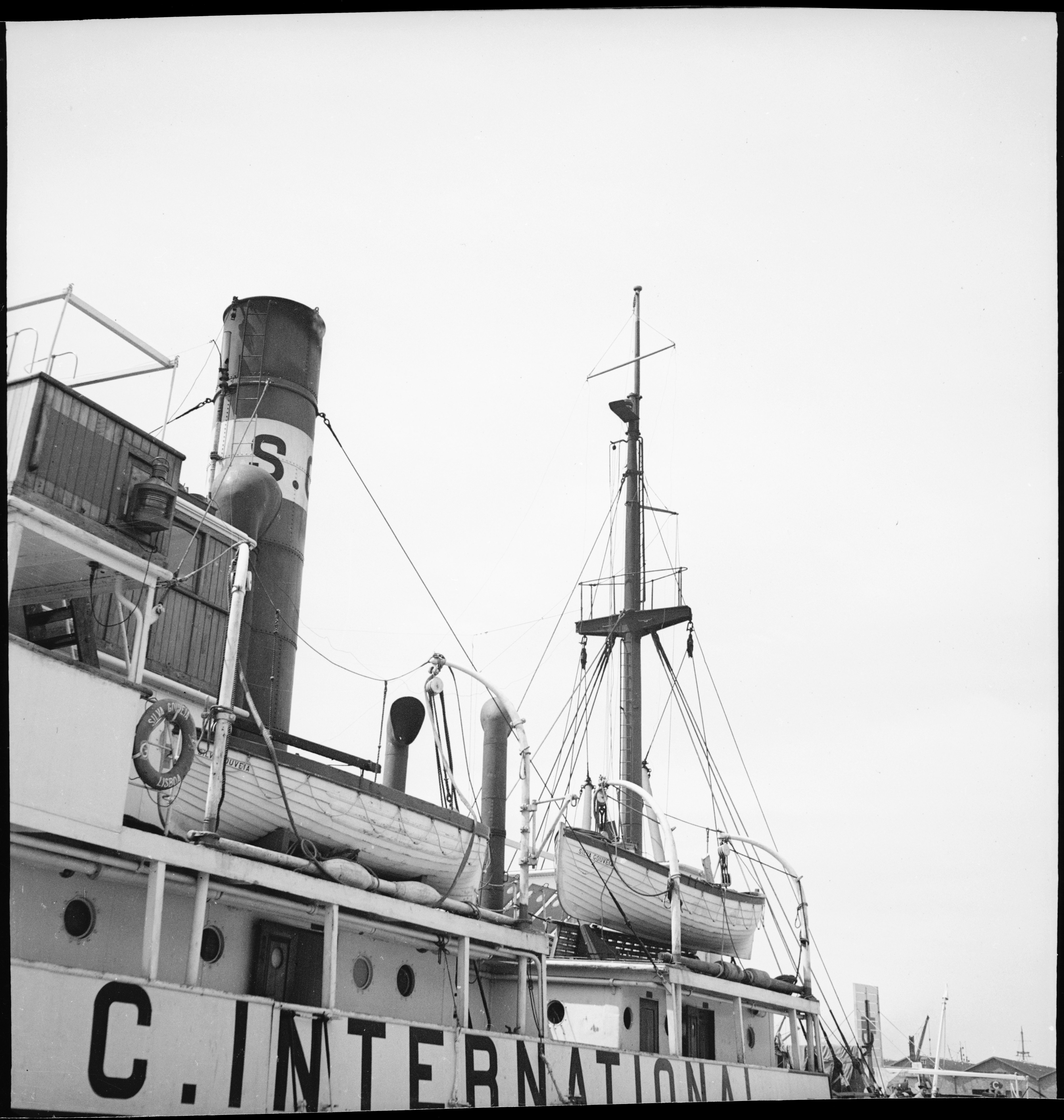 Portugal, Lissabon (Lisboa): Schiff Silva Gouveia; Blick auf ein Schiff, dass die Flagge des Roten Kreuzes trägt